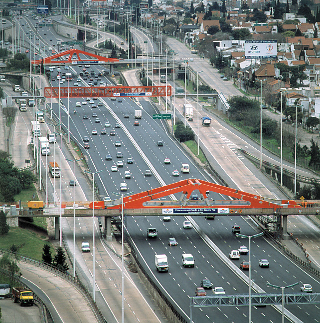 Avenida General Paz entre la Avenida Cabildo y la Autopista Panamericana (Ruta Nacional 9) desde el edificio torre ubicado en Cabildo y General Paz. A la derecha, Provincia de Buenos Aires, a la izquierda, Ciudad de Buenos Aires.